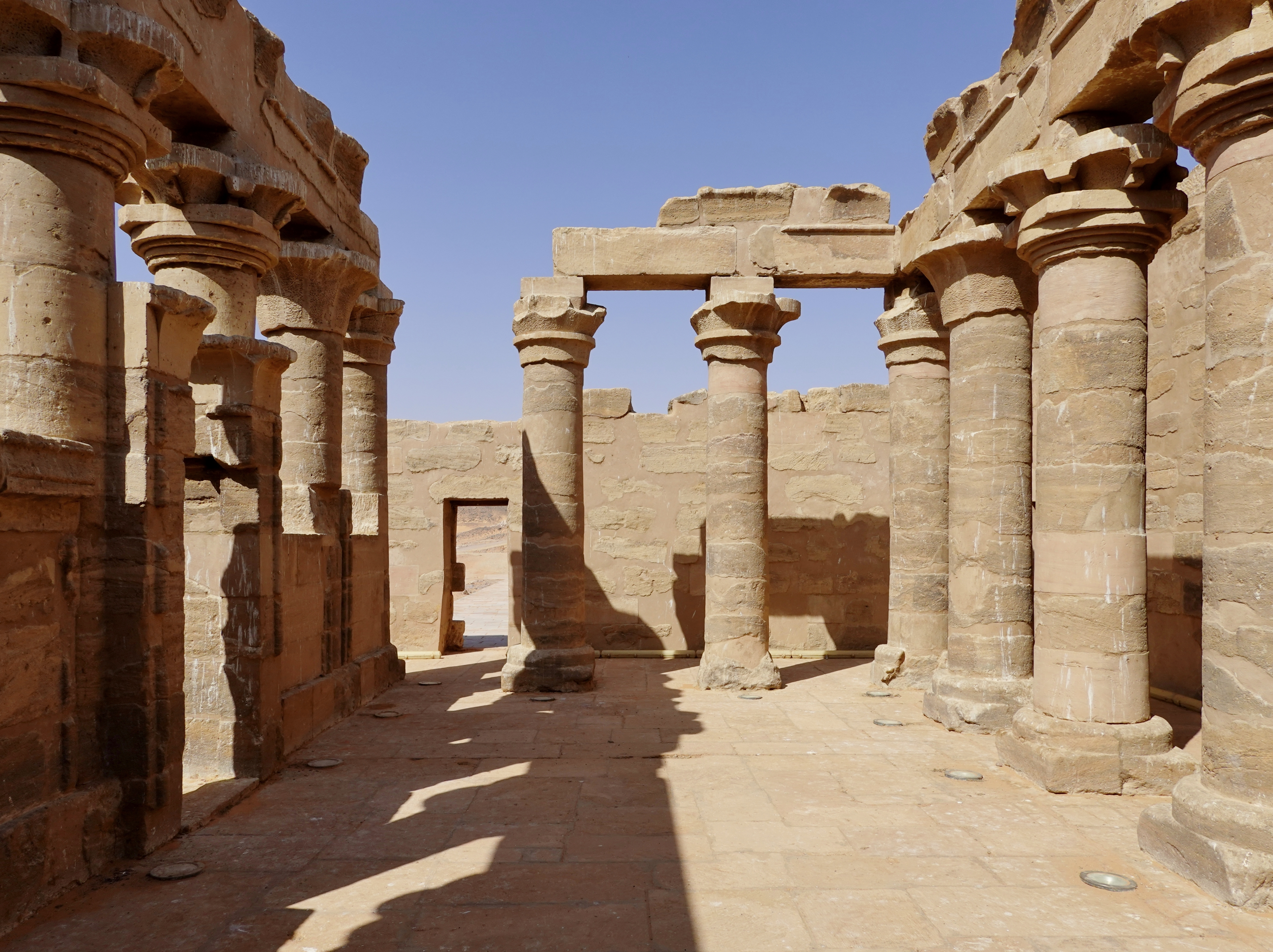 Innenraum des Tempels von Maharraka am Nassersee, Ägypten